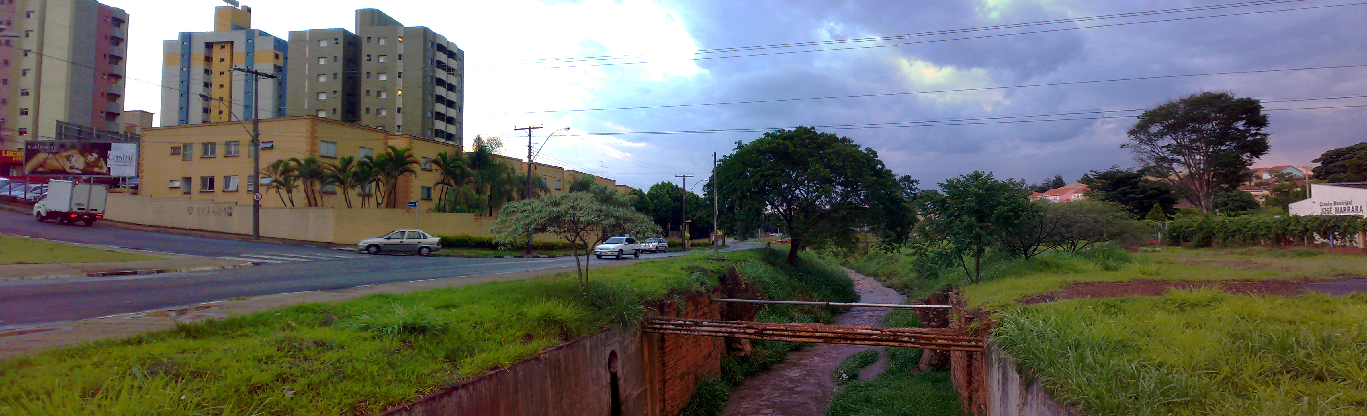 São Carlos after a rainy day.